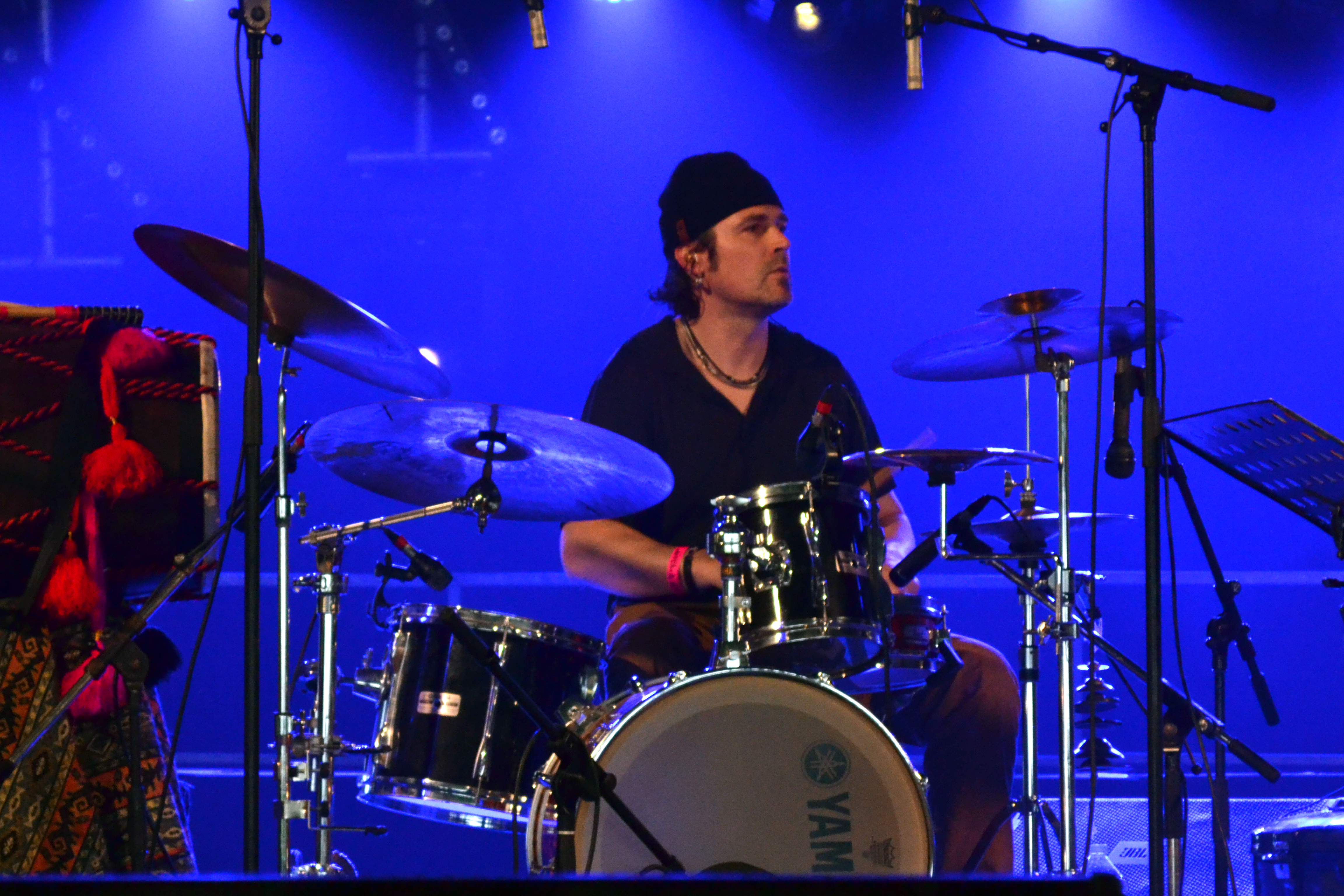 Jérôme Kerihuel avec le groupe du sonneur Konogan an Habask, Pevarlamm KH, en concert au Gouel Bro Leon le 16 juin 2013.